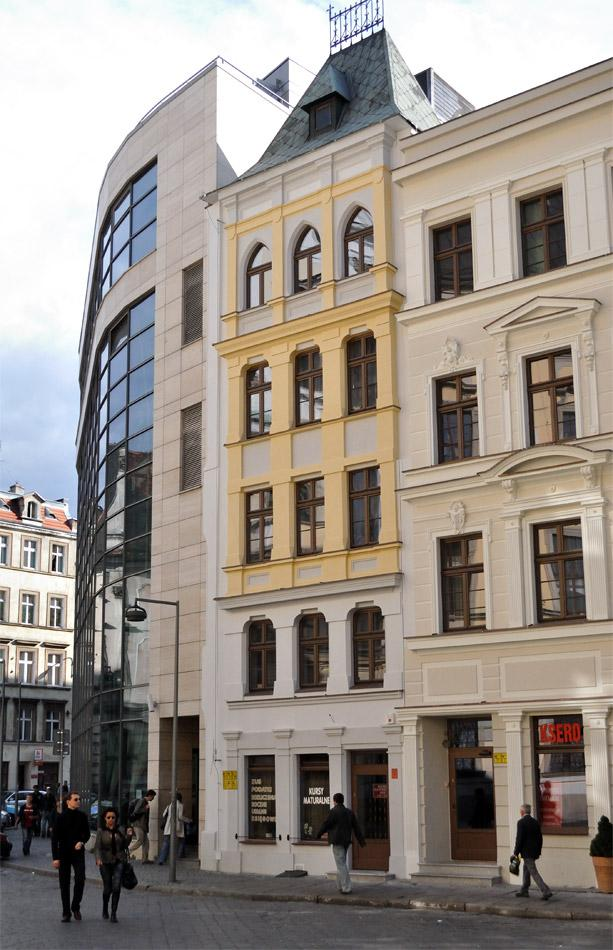 Jedna z węższych wrocławskich kamienic.